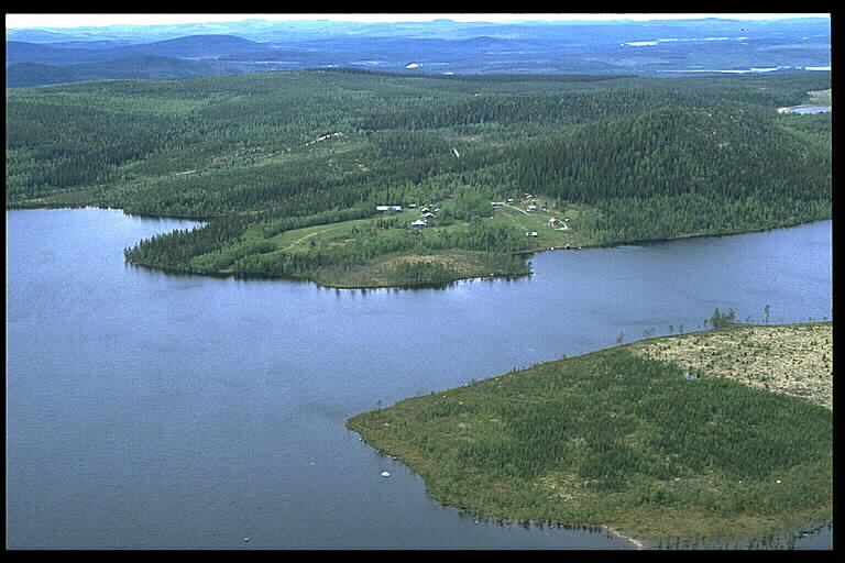 Motiv: Västra Storsjö Nyckelord: Flygbilder, Riksintressen Kategori: Insjömiljöer Västra Storsjö